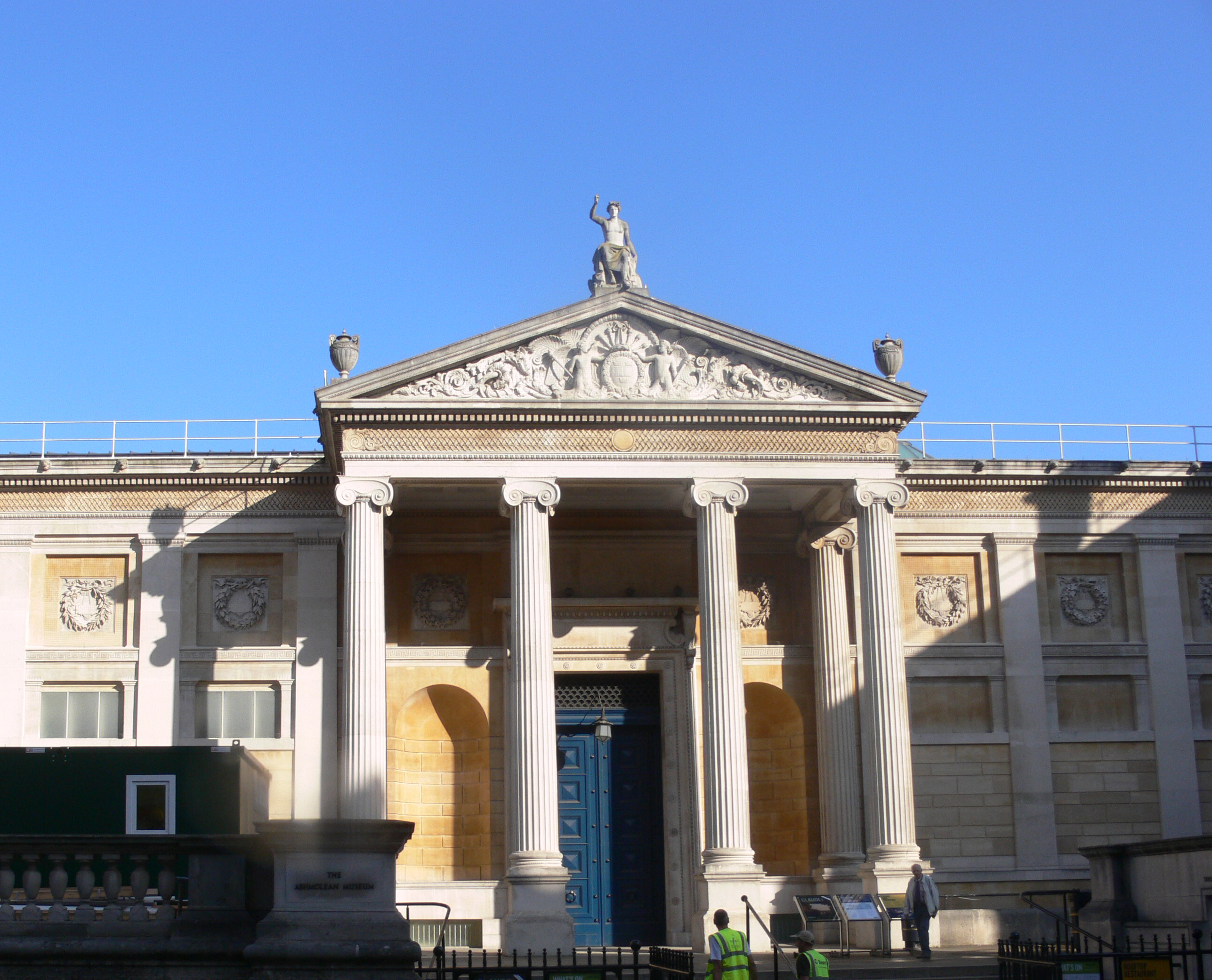 Oxford - Ashmolean Museum